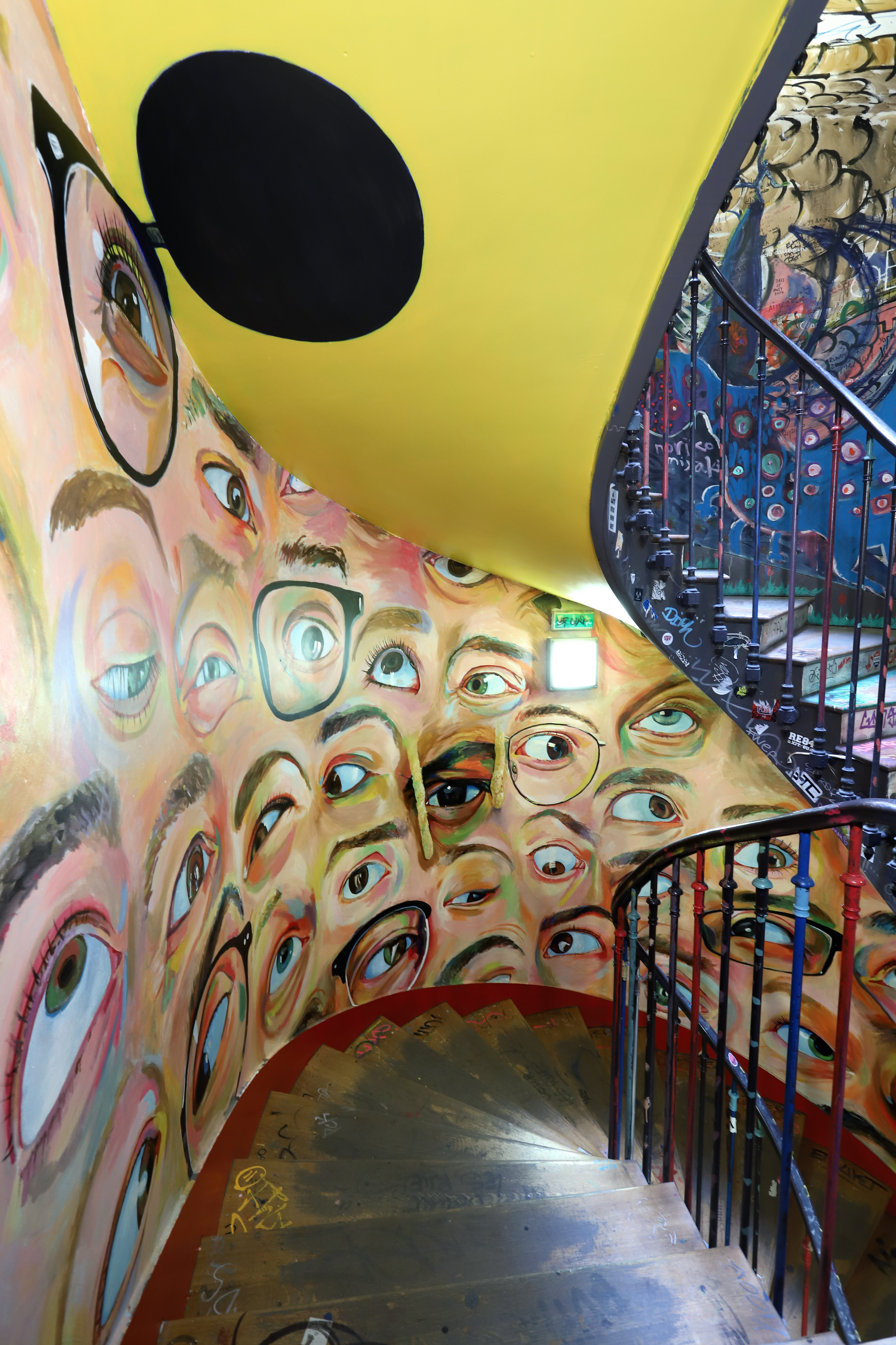 es